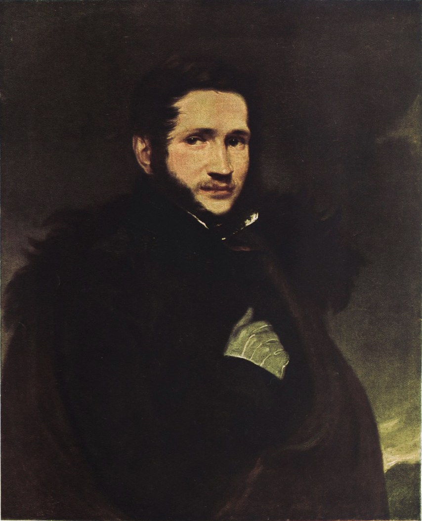 Der Bildhauer Adam Rammelmayer (auch: Ramelmayer, Ramelmayr). Öl/Leinwand, 76 x 61 cm. Sammlung: Österreichische Galerie Belvedere, Wien.